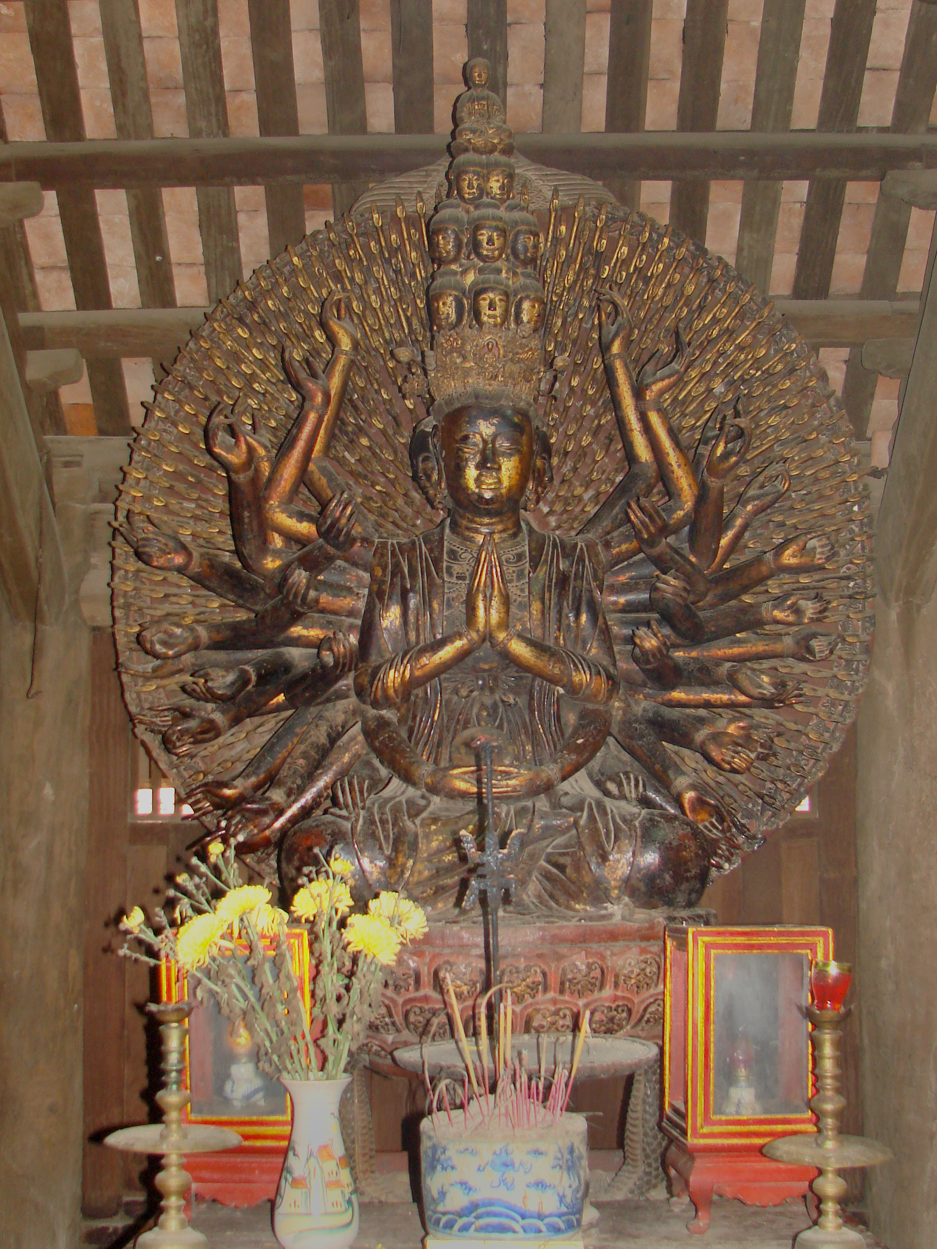 Quan Am dans le sanctuaire de la pagode But Thap. La statue aux mille bras et mille yeux de Quan Am représente le Bodhissattva Avalokiteshvara. La pagode But Thap (Ninh-Phuc) s'élève dans le village de Dinh To, à 30 Km au sud-est de Hanoi. Elle a été érigée en 1646-1647 par le moine chinois Minh Hanh. Elle compte plusieurs bâtiments dont quatre sont entourés d'un mur d'enceinte. Les bâtiments sont reliés par des galeries.